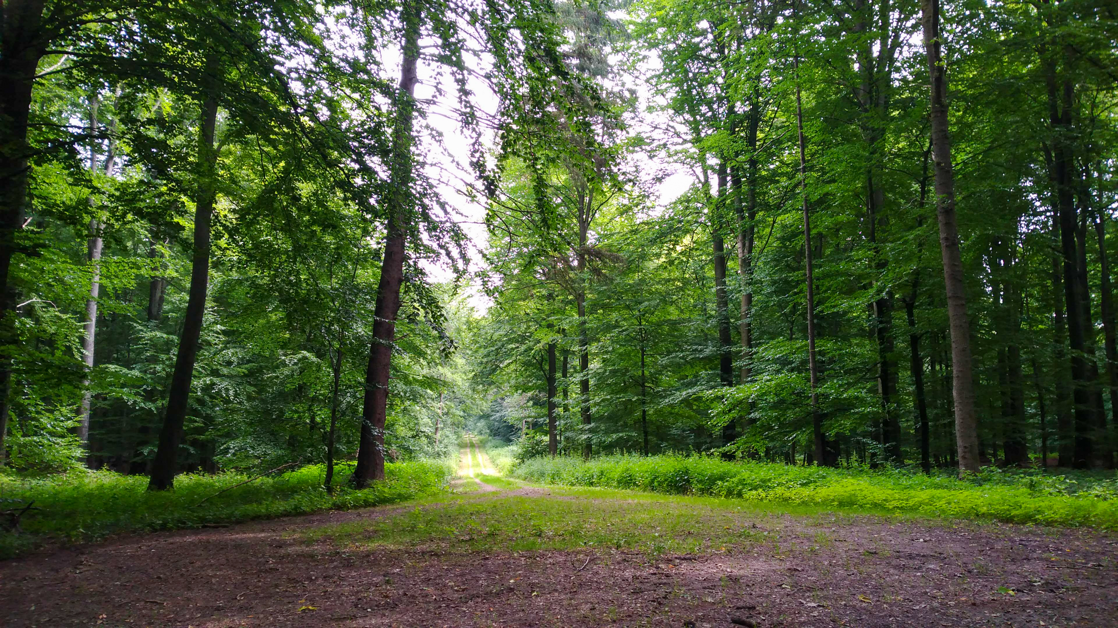 FFH-Gebiet Rehbergholz und Schwennholz